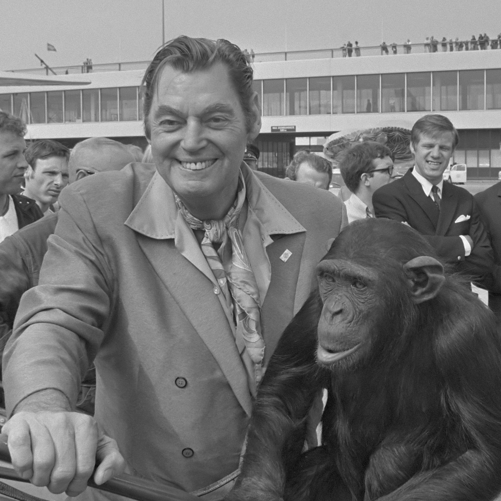 Acteurs Raymond Burr en ex-Tarzan Johnny Weismuller (USA) arriveren op Schiphol; Weismuller met aap 24 juni 1970